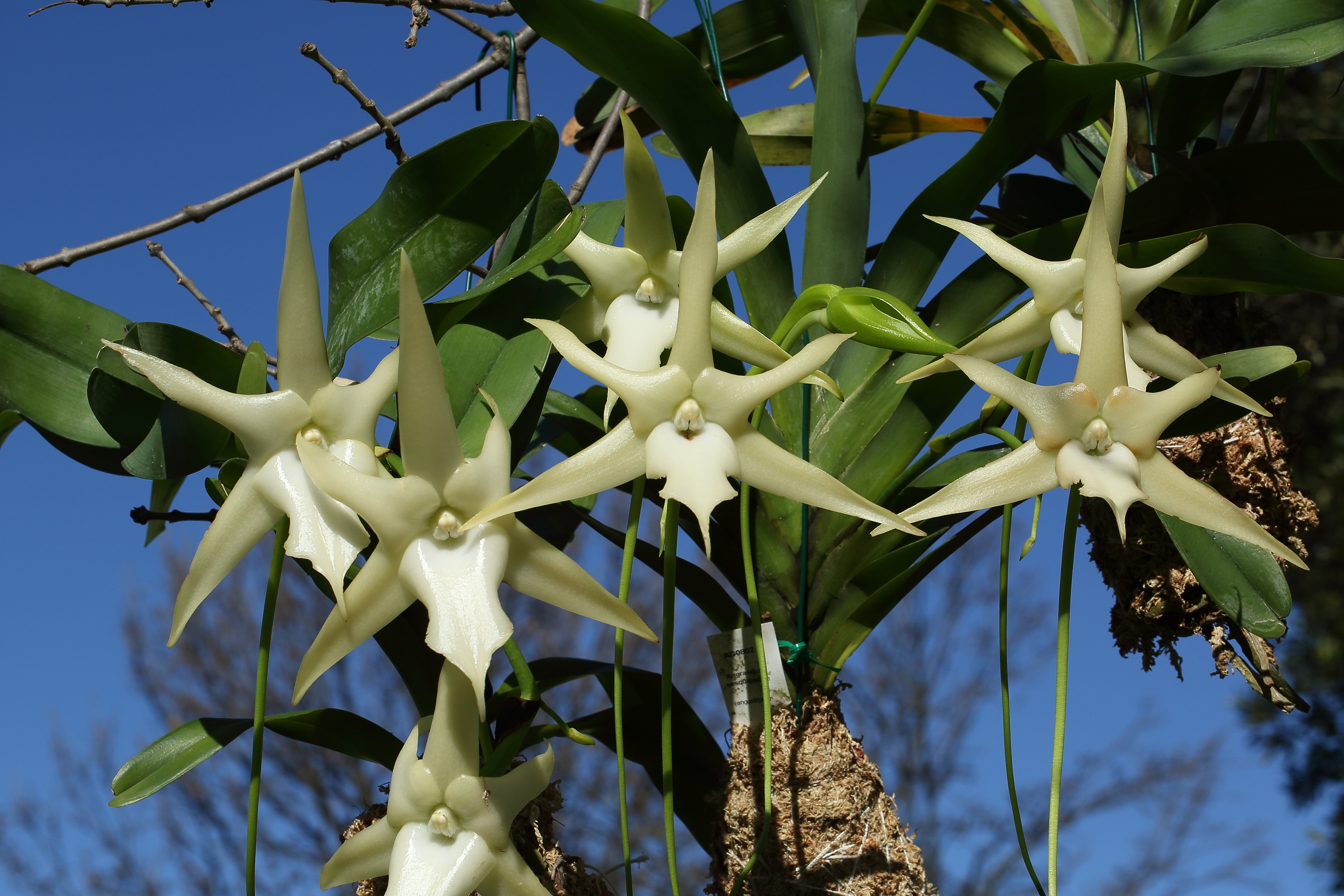 Angraecum sesquipedale